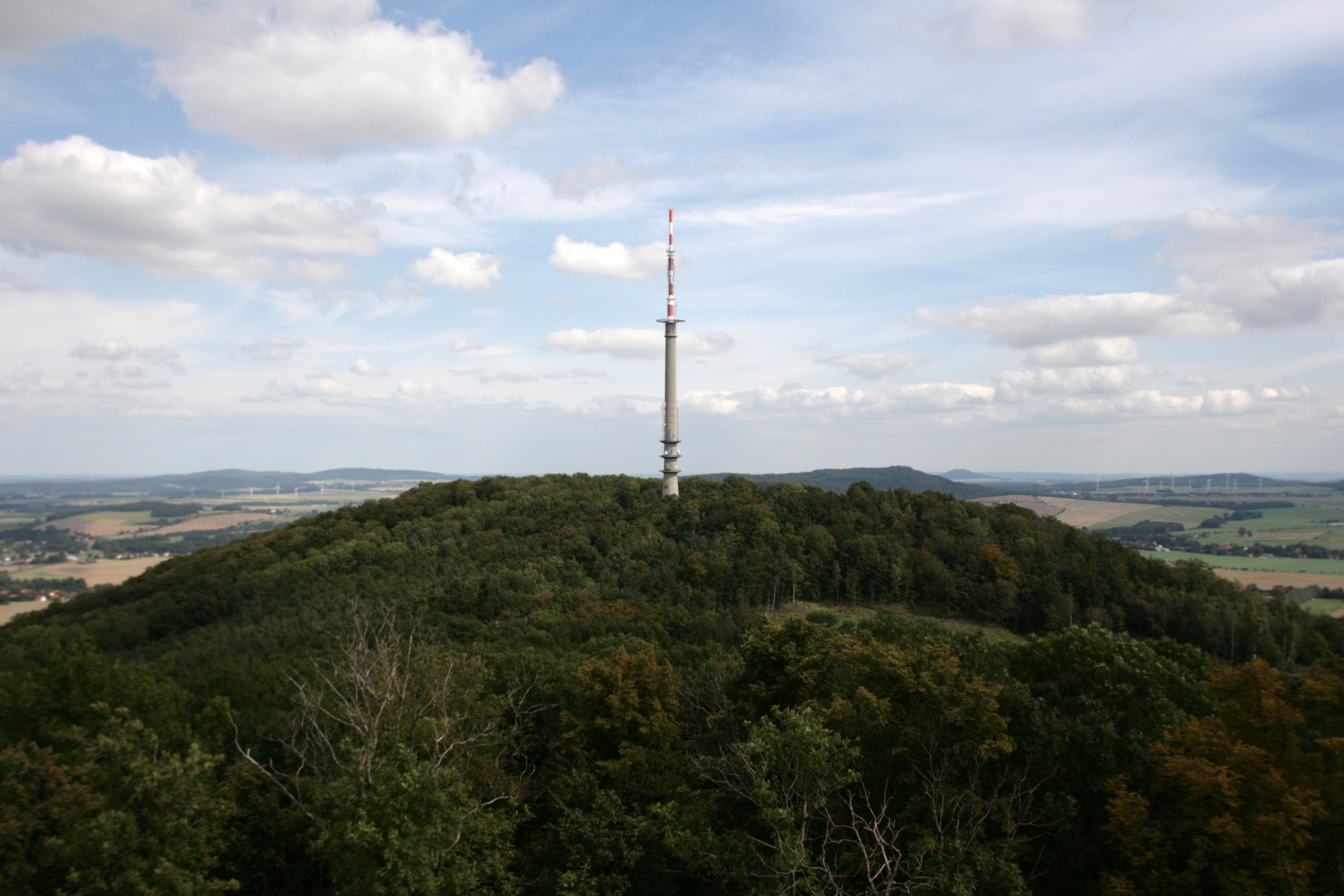 Schafberg, Blick vom König-Friedrich-August-Turm in Löbau